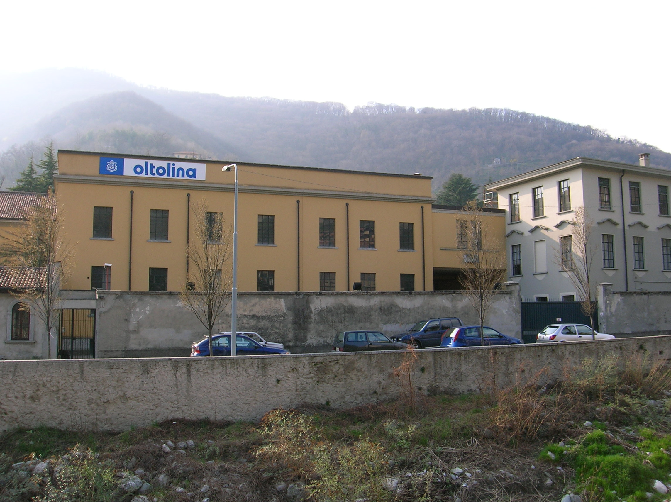 stabilimento dell'Oltolina, fabbrica tessile, a Scarenna, frazione di Asso